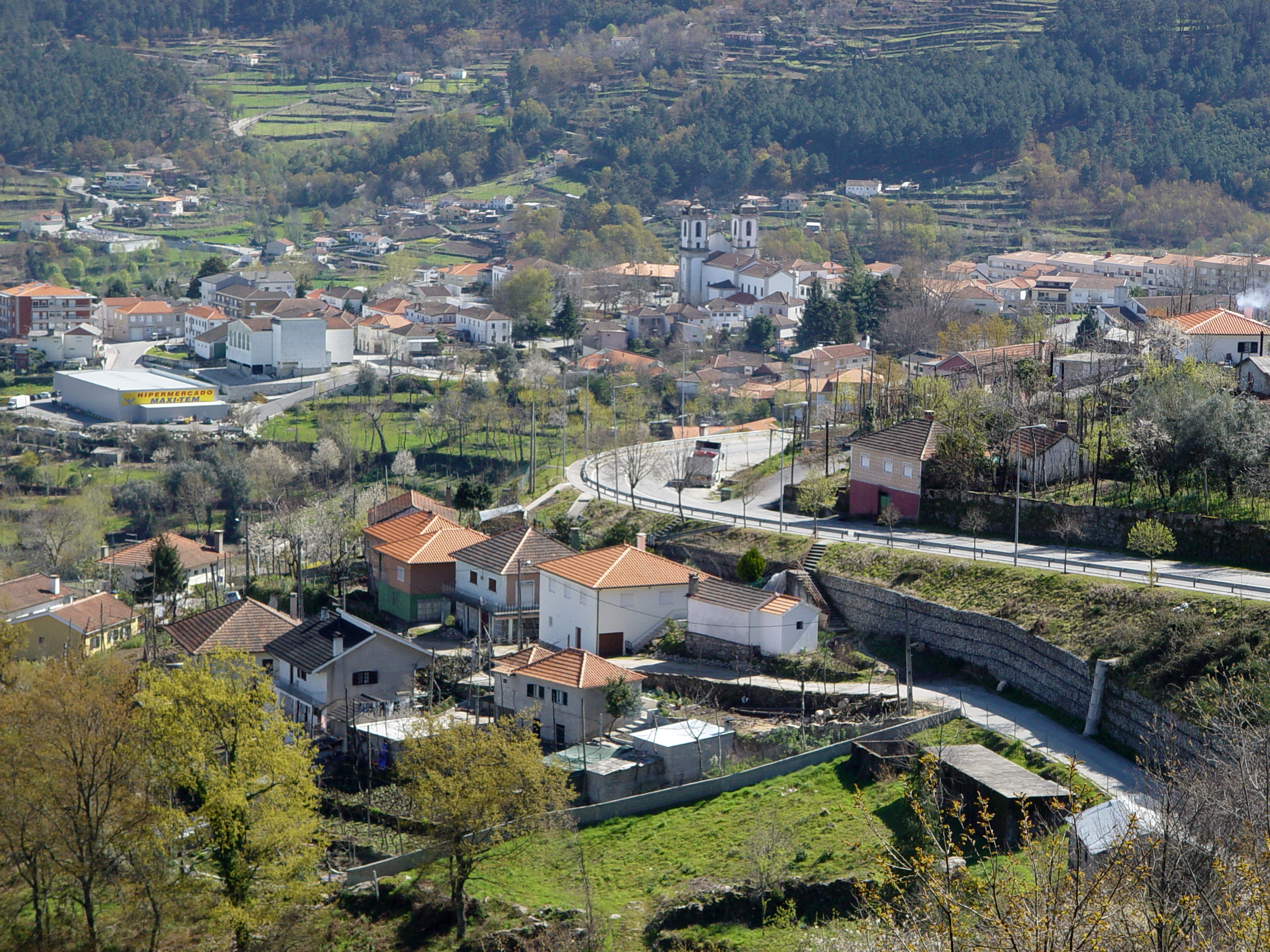 Núcleo urbano da vila de Ribeira da Pena This file was uploaded for Wiki Loves Monuments in Portugal with the unique identifier 97027952.